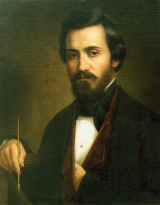 autoportretul artistului la vârsta de 31 de ani, văzut din faţă, în semiprofil stânga, bust